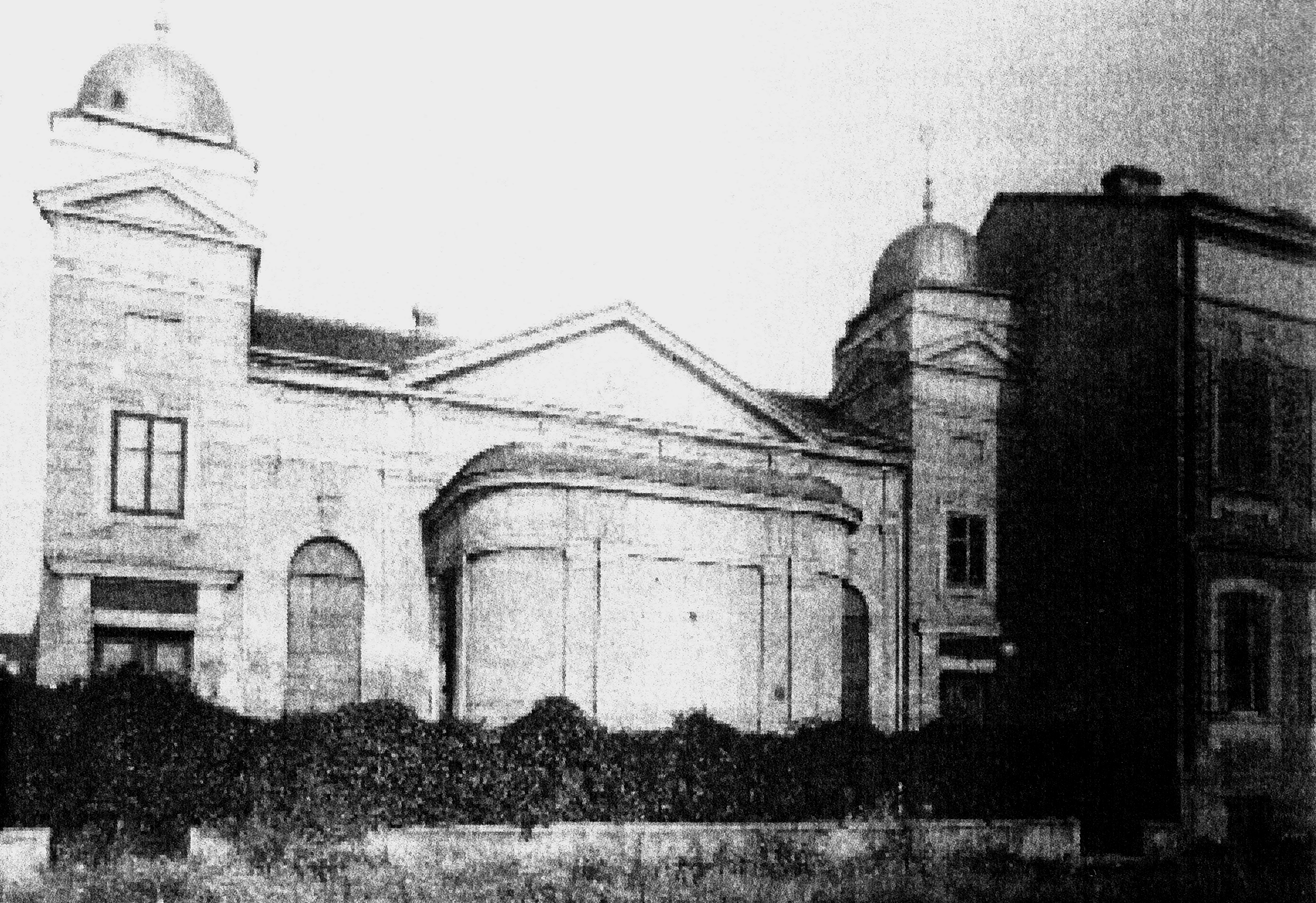 Synagoge für das Gebiet von Atzgersdorf, Mauer, Liesing und Umgebung in der Karlsgasse, später Dirmhirngasse 112, Situation nach dem Umbau 1922